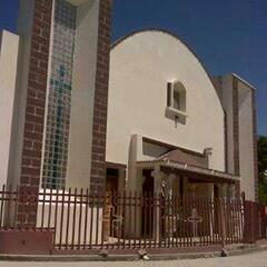 C'est la facade de l'eglise paroissiale de Desdunes